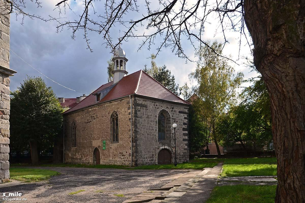 Kaplica Świętego Krzyża